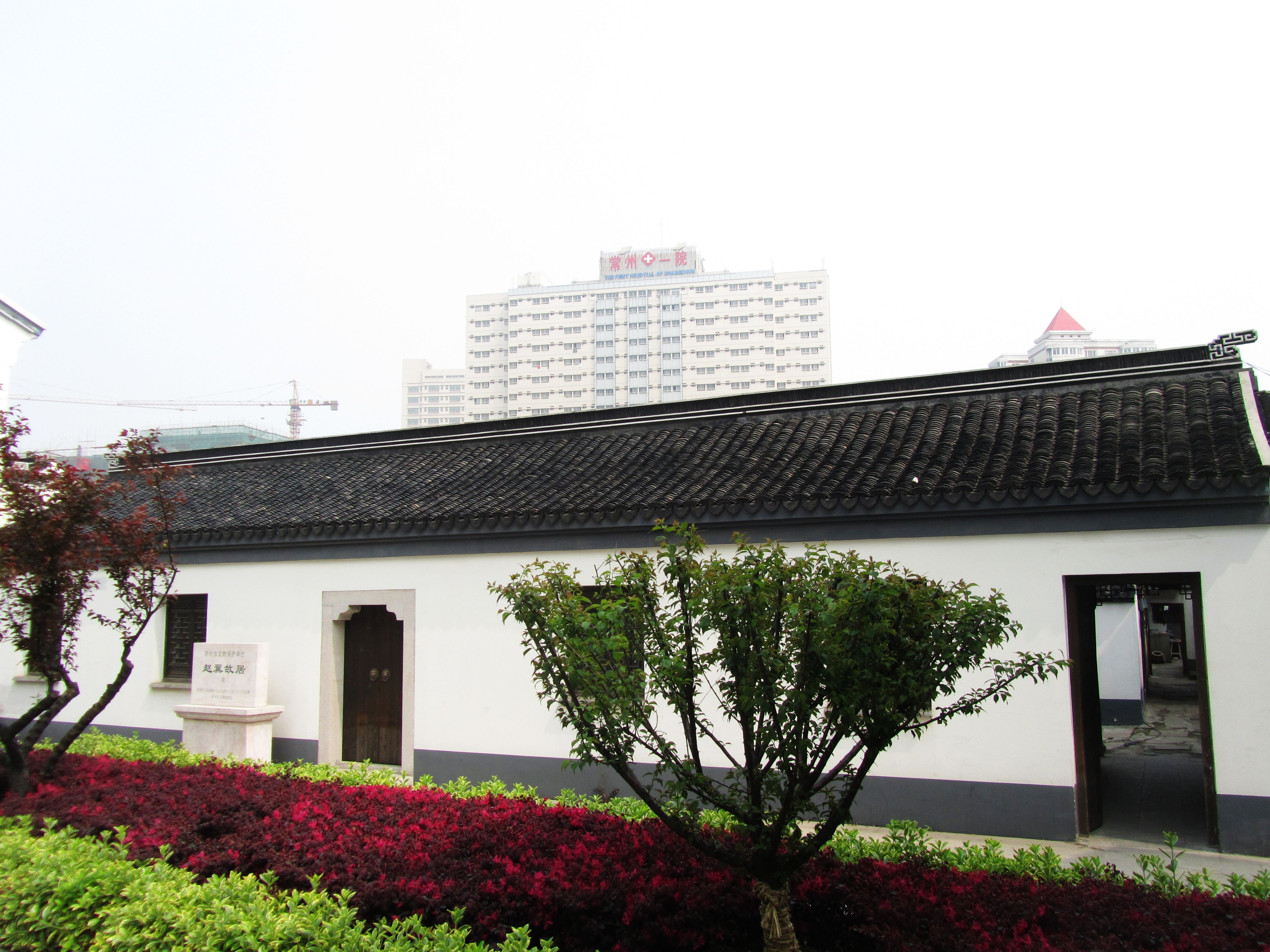 常州前北岸赵翼故居，第二进。